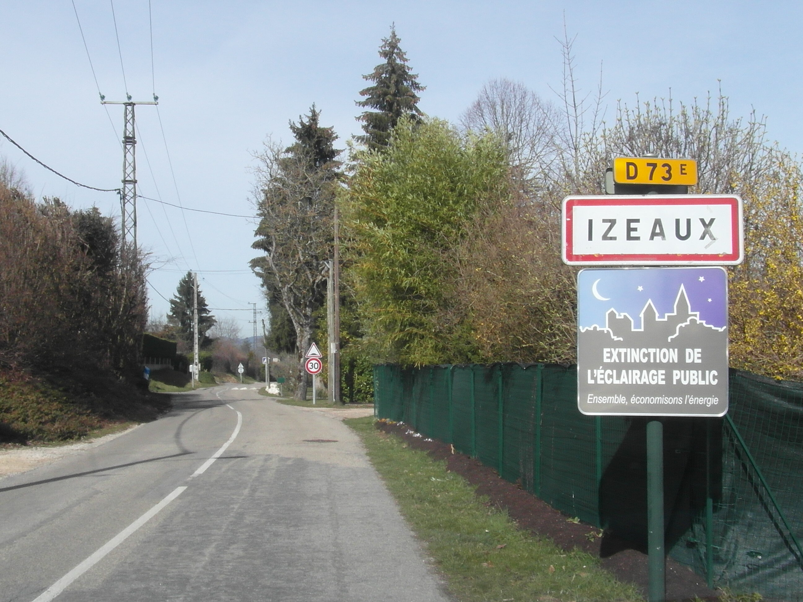 Izeaux (entrée du village) en mars 2019